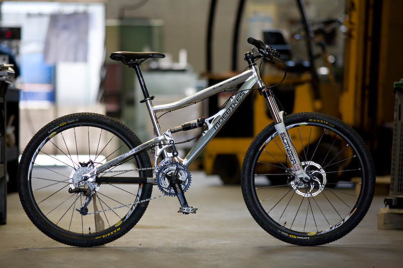 MDEbikes CARVER